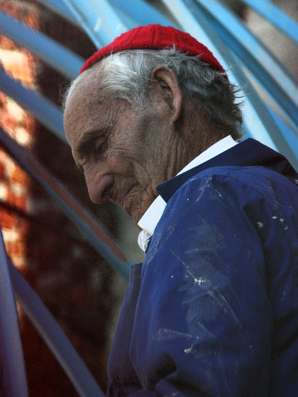 Justo Gallego Martínez trabajando en su catedral de Mejorada del Campo, España